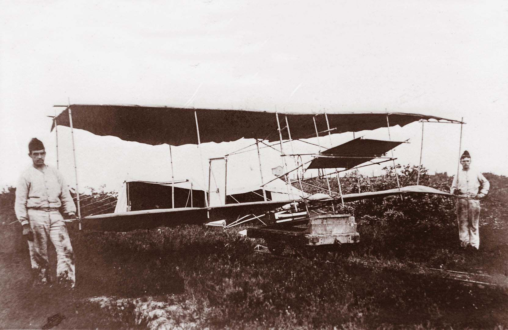 Het zweefvliegtuig waarmee Willem-Hendrik Schukking in 1908 op het militair oefenterrein De Stompert de eerste zweefvlucht in Nederland maakte. Naast het zweeftoestel twee genisten.